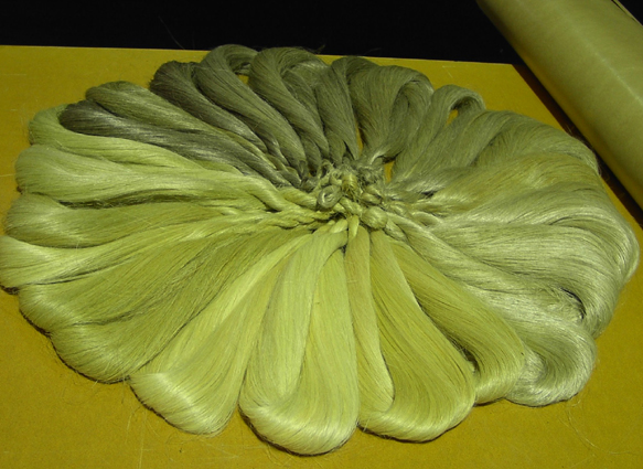 Lingarner i olika blekning.